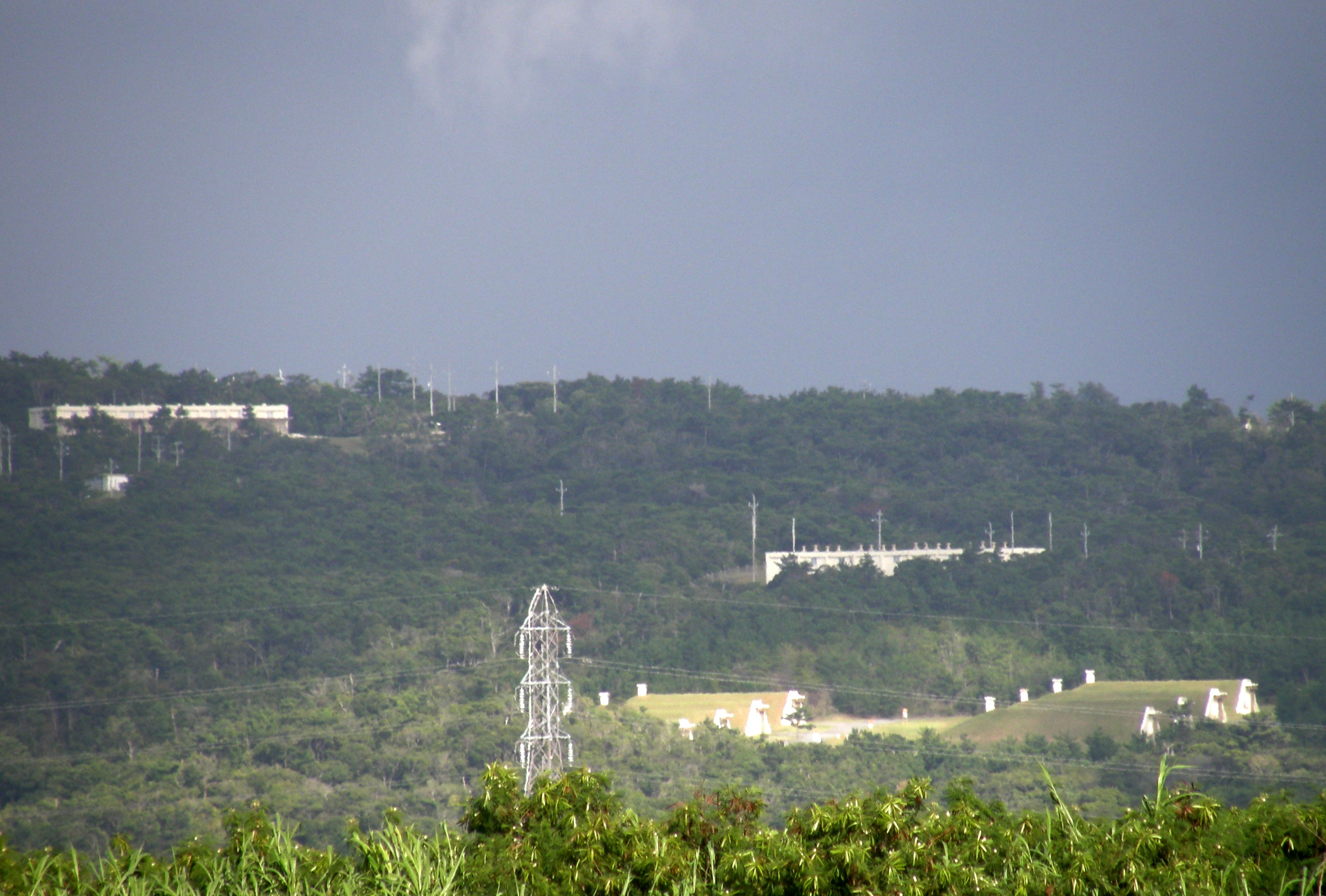 嘉手納弾薬庫